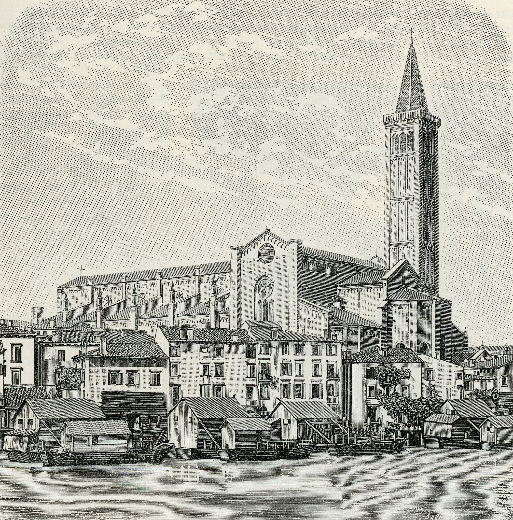 Verona: chiesa di Sant’Anastasia (xilografia).